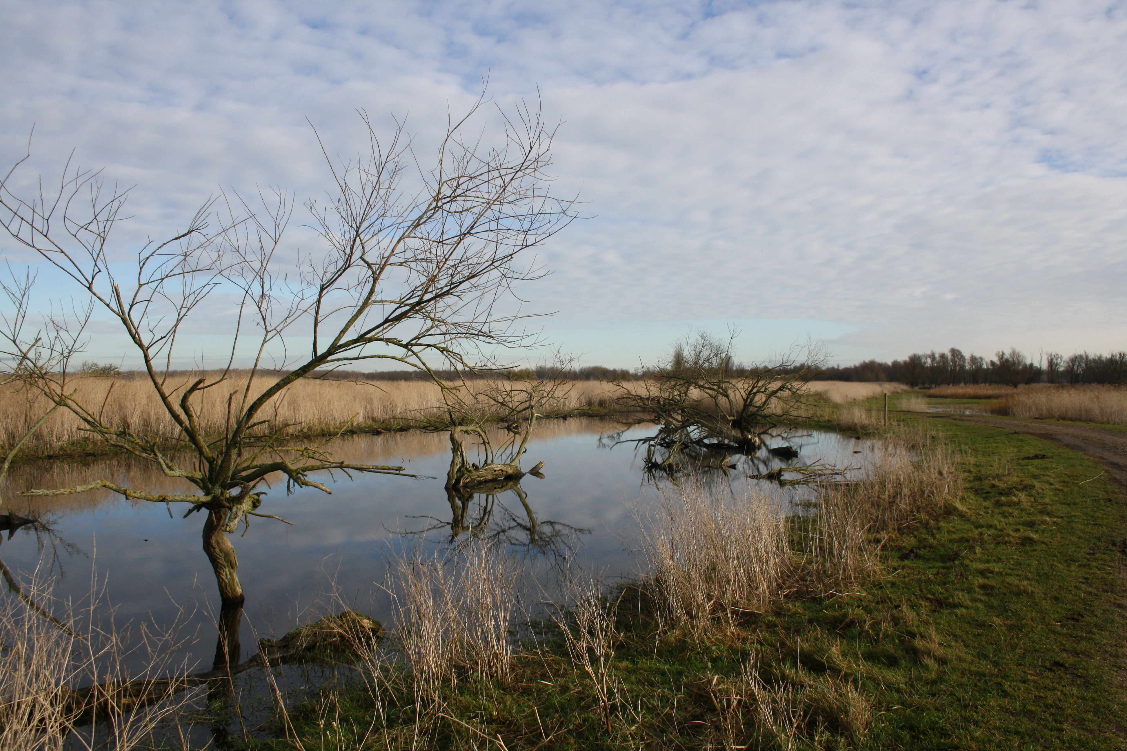 Oostvaardersplassen herfst 2012